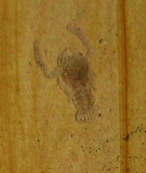 Fossil of Knebelia, an extinct crustacean- Took the photo at Fossil Show, Munchen 2011